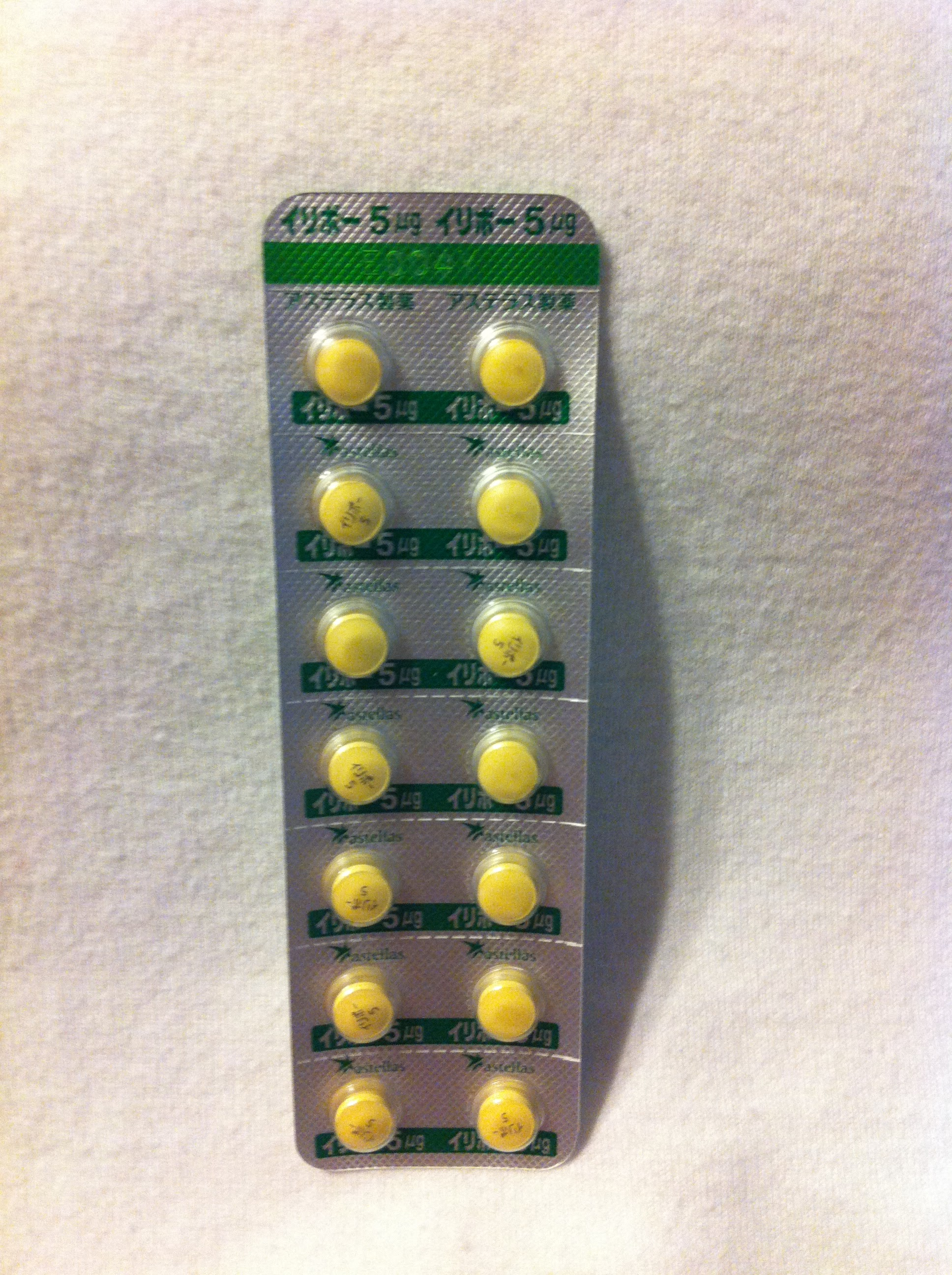 日本国内で流通しているアステラス製薬製イリボー 5μg錠剤のシート